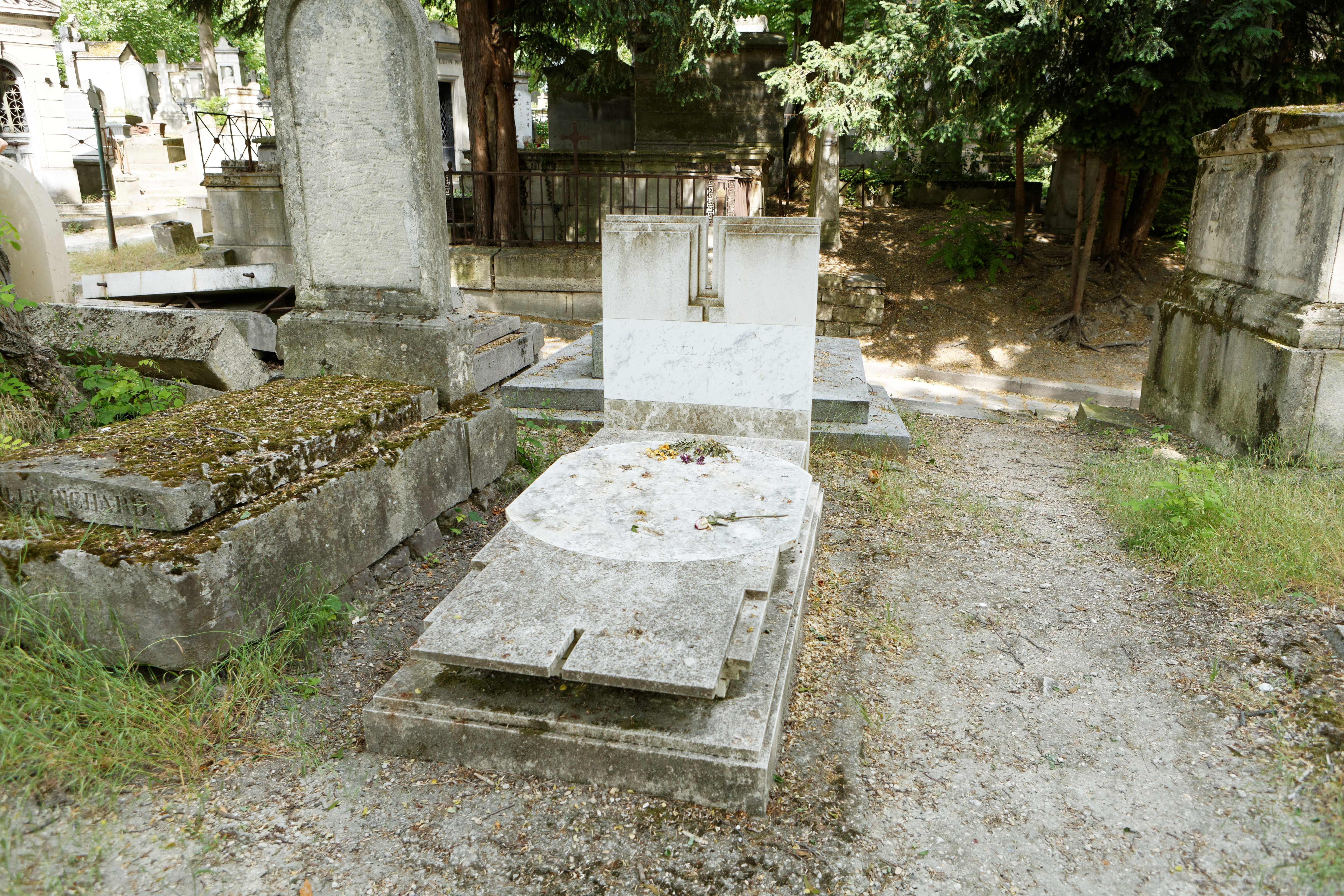 Sépulture de Karel Appel (1921-2006), peintre et sculpteur néerlandais, cofondateur du groupe CoBrA.